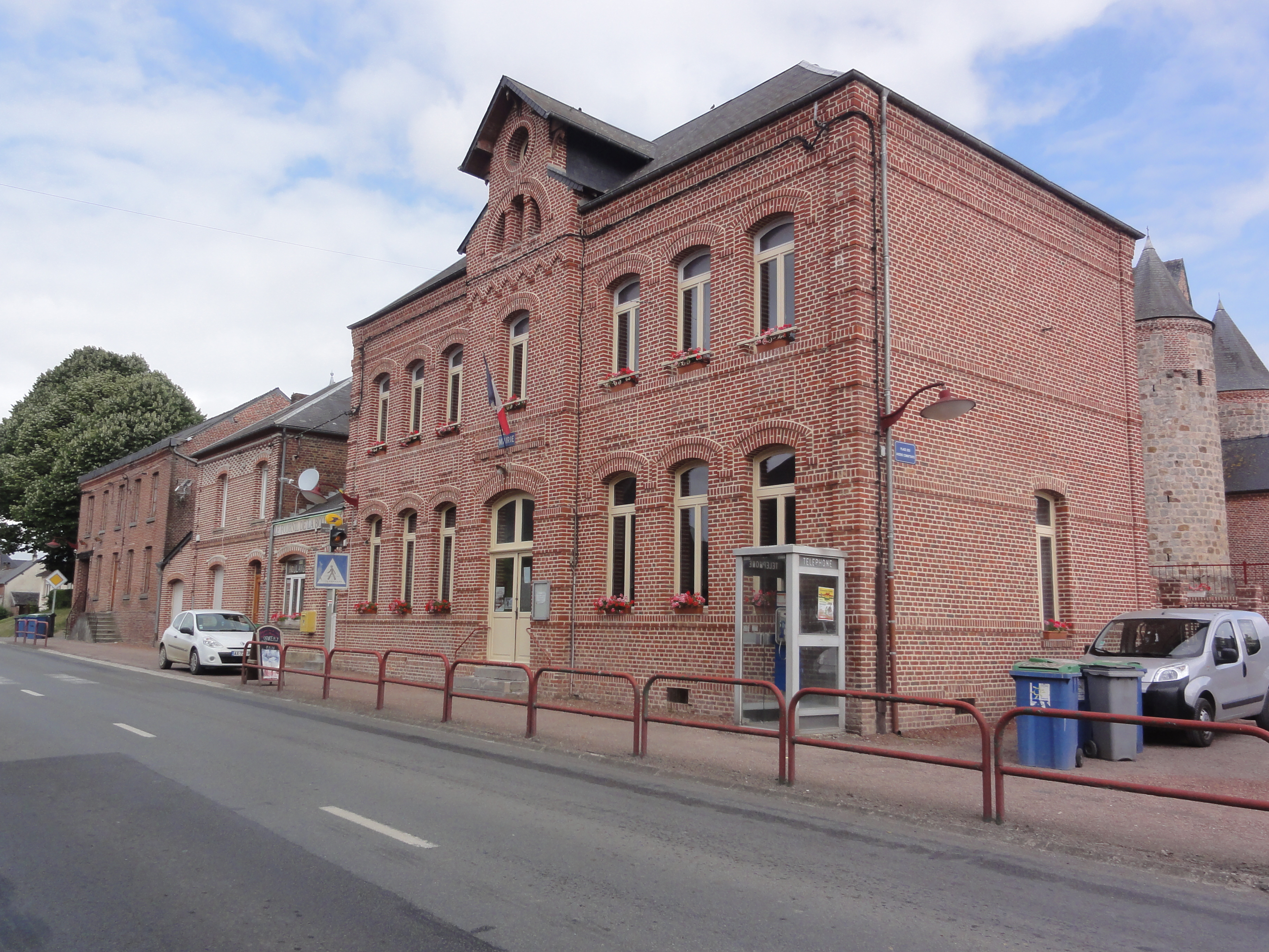 La Bouteille (Aisne) mairie